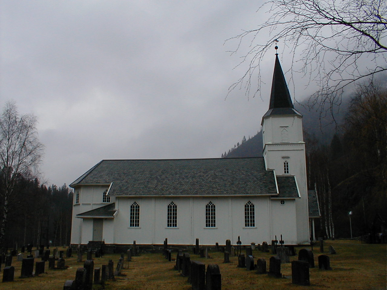 Skjønne kirke er en langkirke fra 1879 i Nore og Uvdal kommune, Buskerud fylke, Norge.